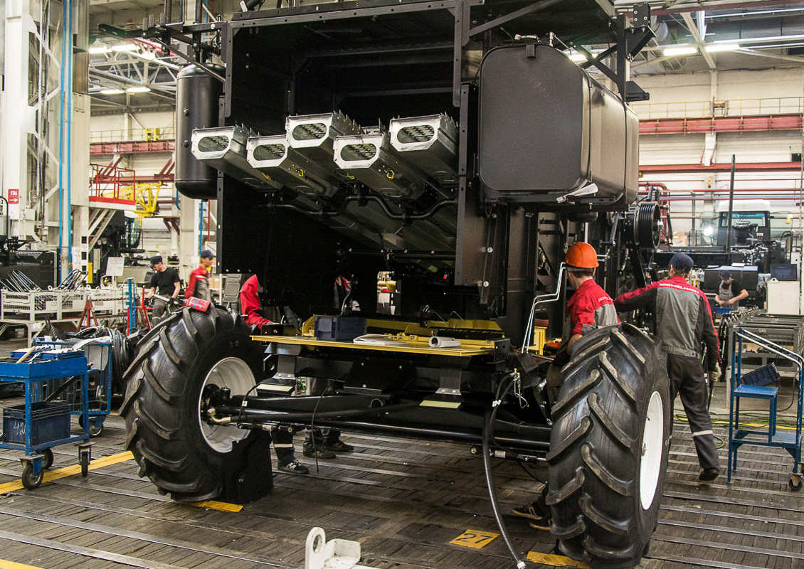 Вики-экскурсия на "РСМ": сборочный конвейер